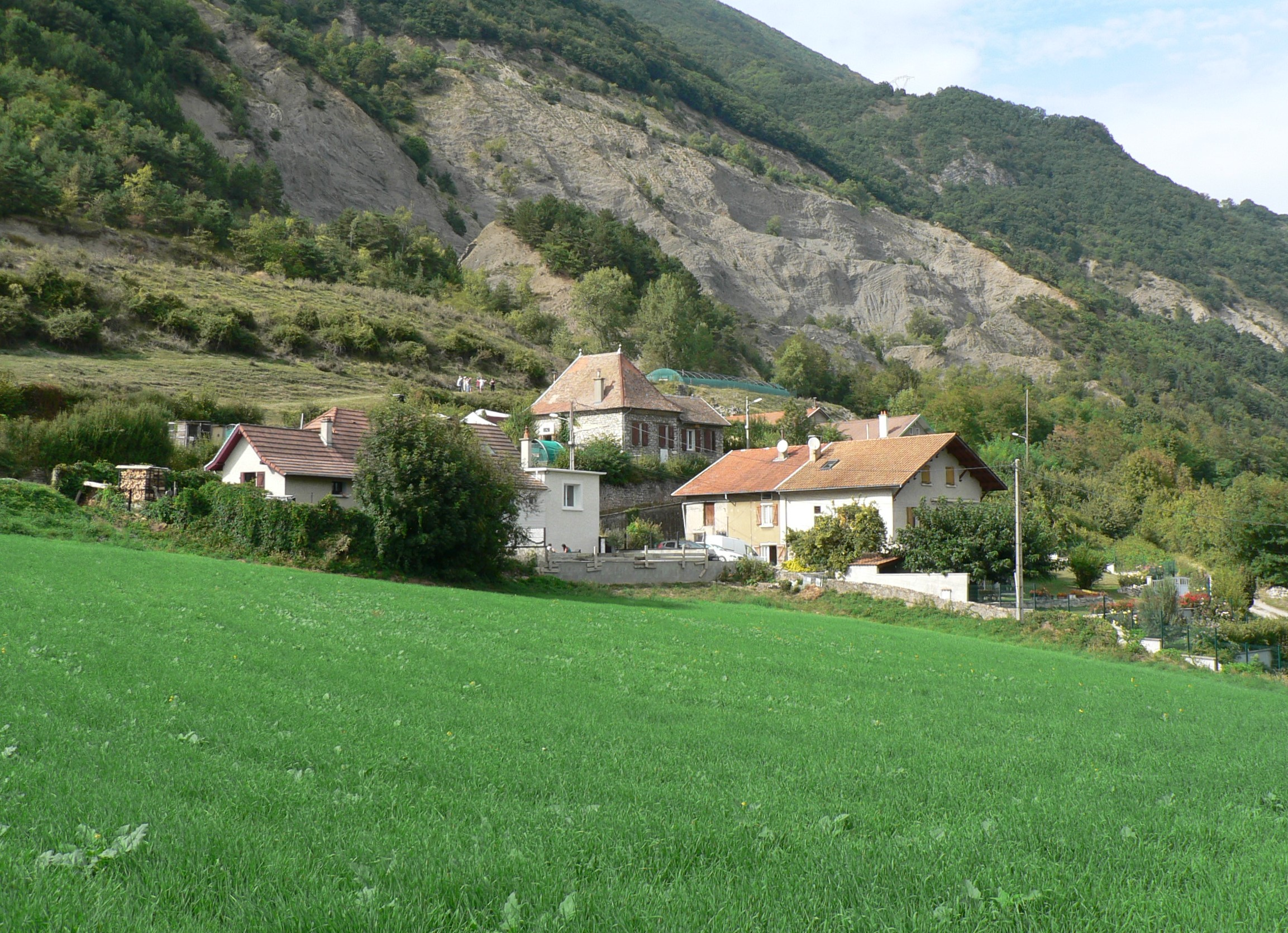 Le Tichodrome (Le Gua), centre de sauvegarde de la faune sauvage. Ouvert au public à l'occasion des Journées du patrimoine. Au fond, l'ancienne carrière de Vicat.